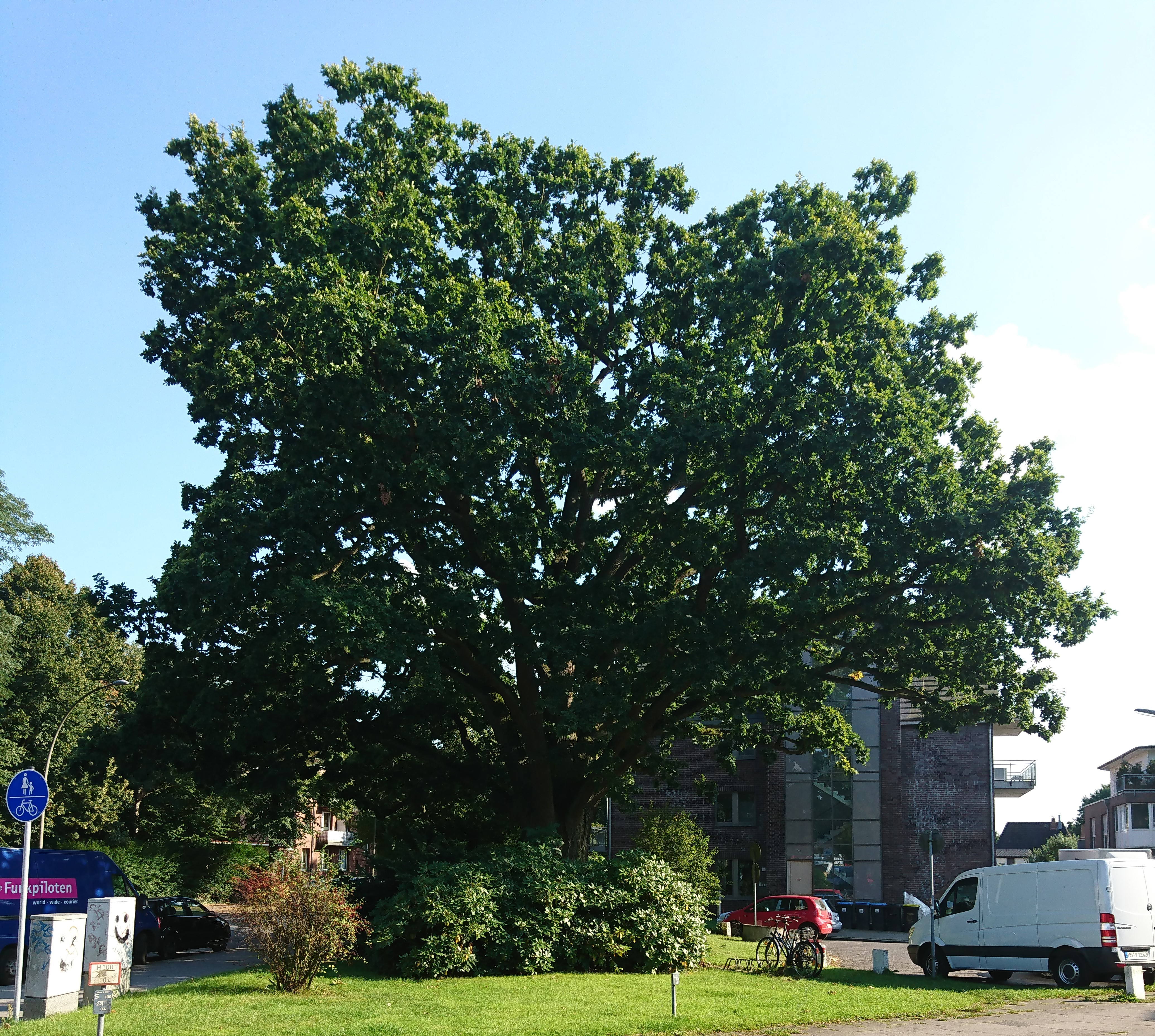 Im Herbst 1871 wurde die Friedenseiche an der Langenhorner Chaussee 155, gegenüber der Einmündung zur Tangstedter Landstraße gepflanzt, die zu dem Zeitpunkt etwa zehn Jahre alt war und aus der Langenhorner Feldmark ausgegraben wurde. Damit dürfte die Langenhorner Friedenseiche im Jahre 2017 etwa 156 Jahre alt gewesen sein. Vor der Friedenseiche wurde Gedenkstein aufgestellt, der an drei tote Langenhorner erinnerte, die in dem Deutsch-Französischen Krieg gefallen waren. Heute befindet sich ungefähr an der Stelle des Steines der Langenhorner Wappenstein.